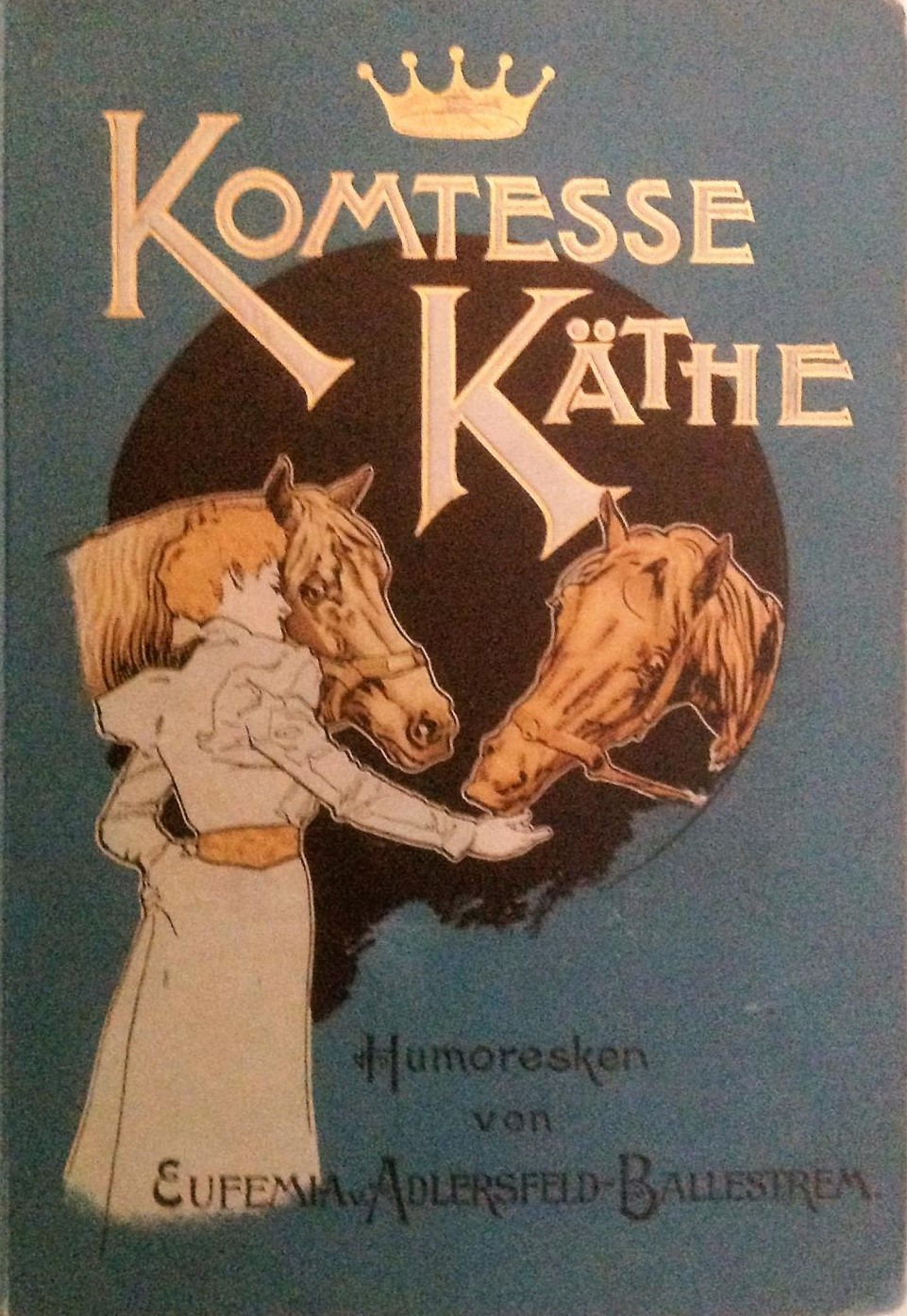 Eufemia von Adlersfeld-Ballestrem: Komtesse Käthe. Humoresken. Illustriert von Fedor Czabran und O. Gerlach. Leipzig: Philipp Reclam jun. Verlag. 10. Auflage o.J.; um 1910.